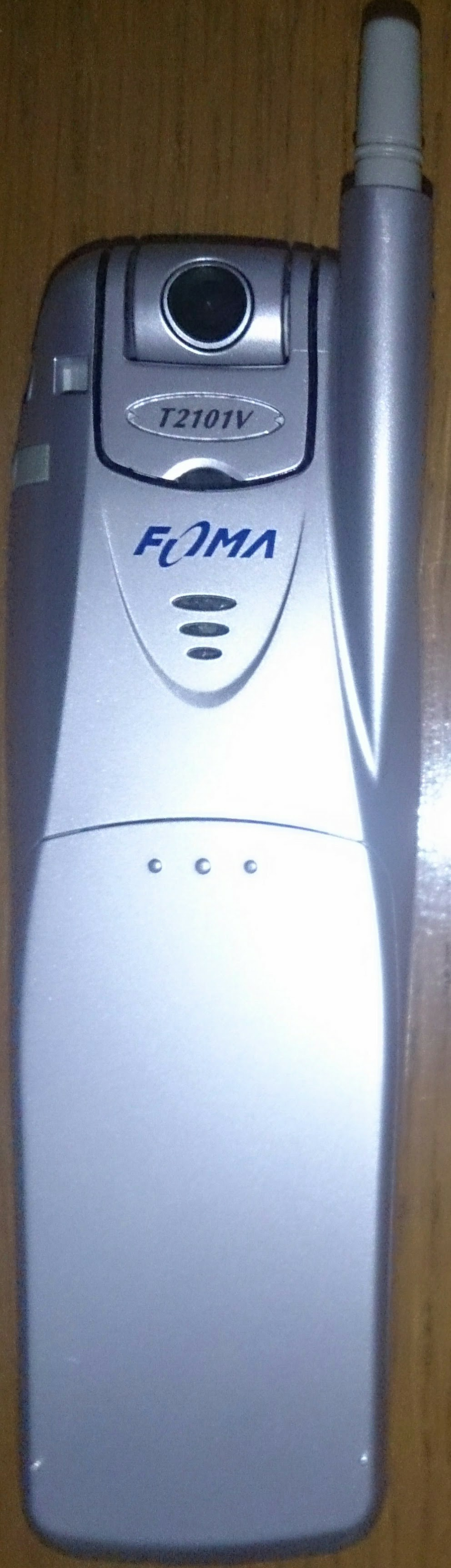 T2101V・背面